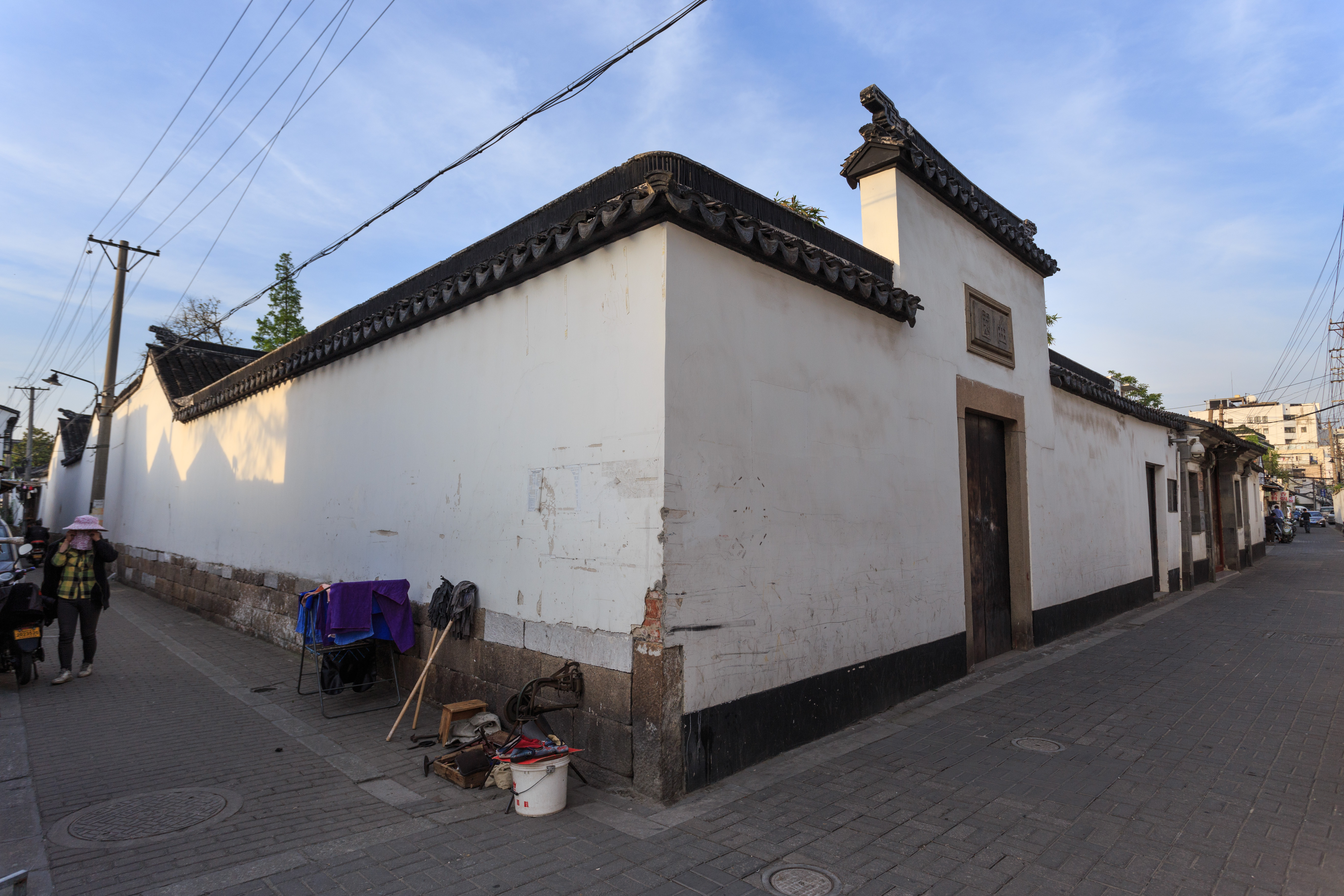 苏州俞樾旧居——曲园